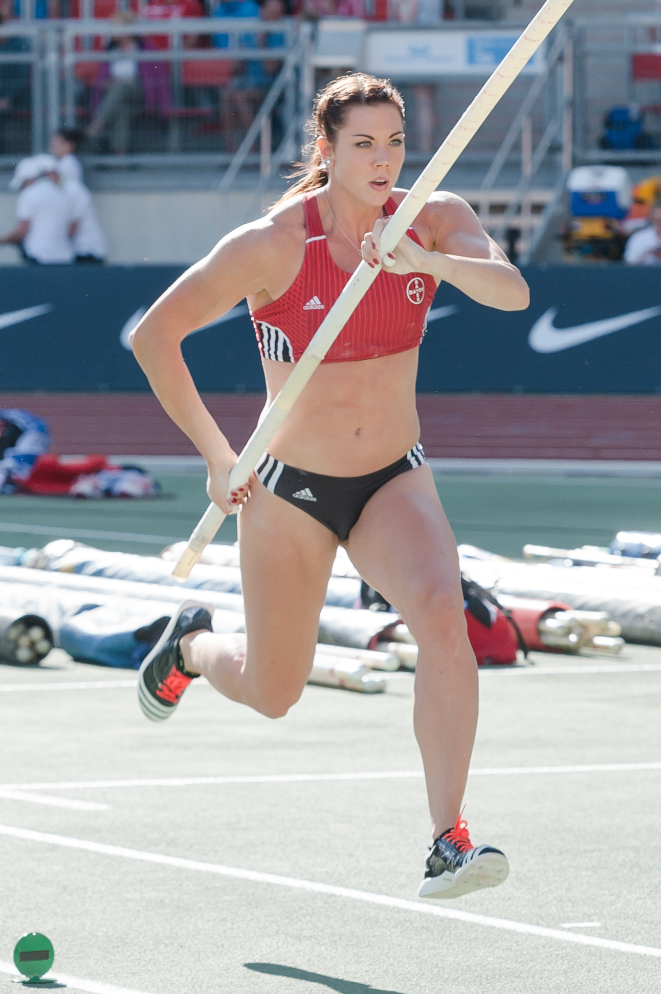 Deutsche Leichtathletik-Meisterschaften 2015: Frauen Stabhochsprung - Katharina Bauer, TSV Bayer 04 Leverkusen